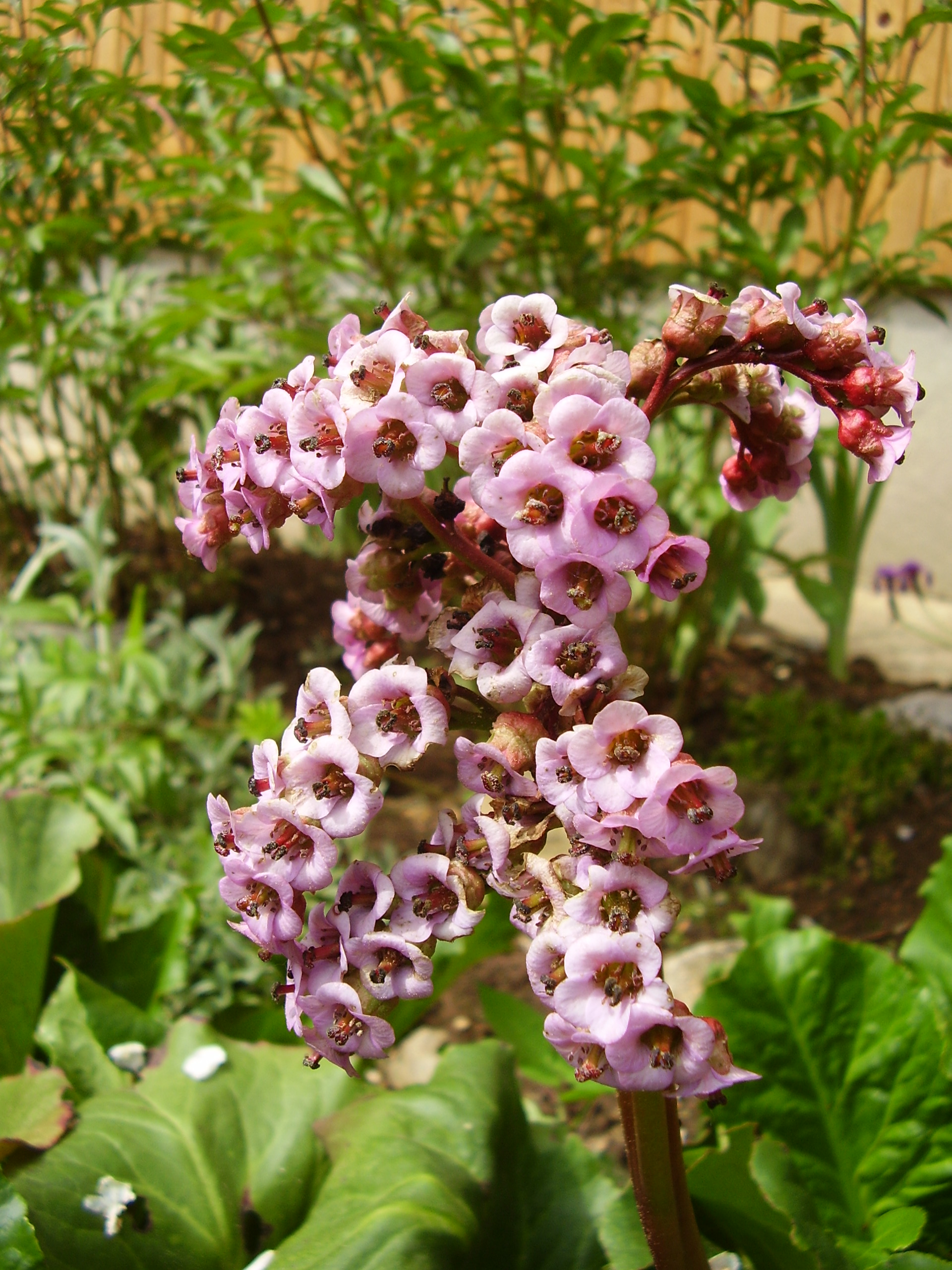 bergenie tučnolistá (Bergenia crassifolia)